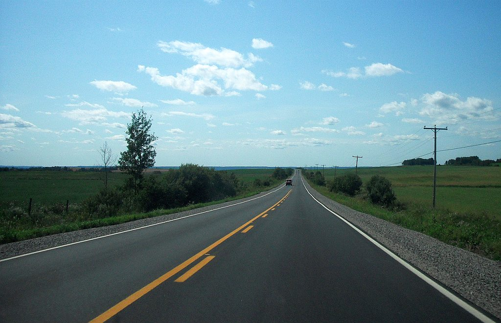 Vue sur la route 391, à Saint-Eugène-de-Guigues, au Témiscamingue.